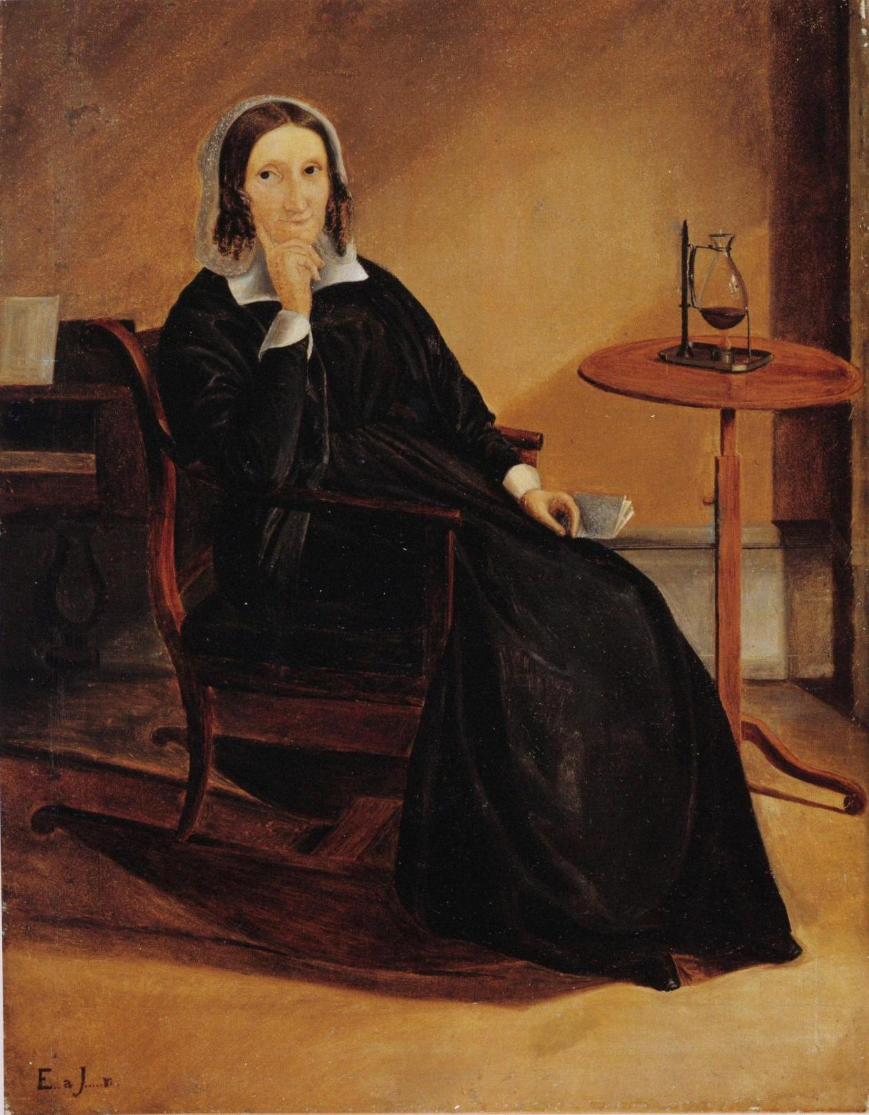 Kirjailija Sara Wacklin, Edla Jansson-Blommérin maalaama muotokuva ajalta hieman ennen Wacklinin kuolemaa.